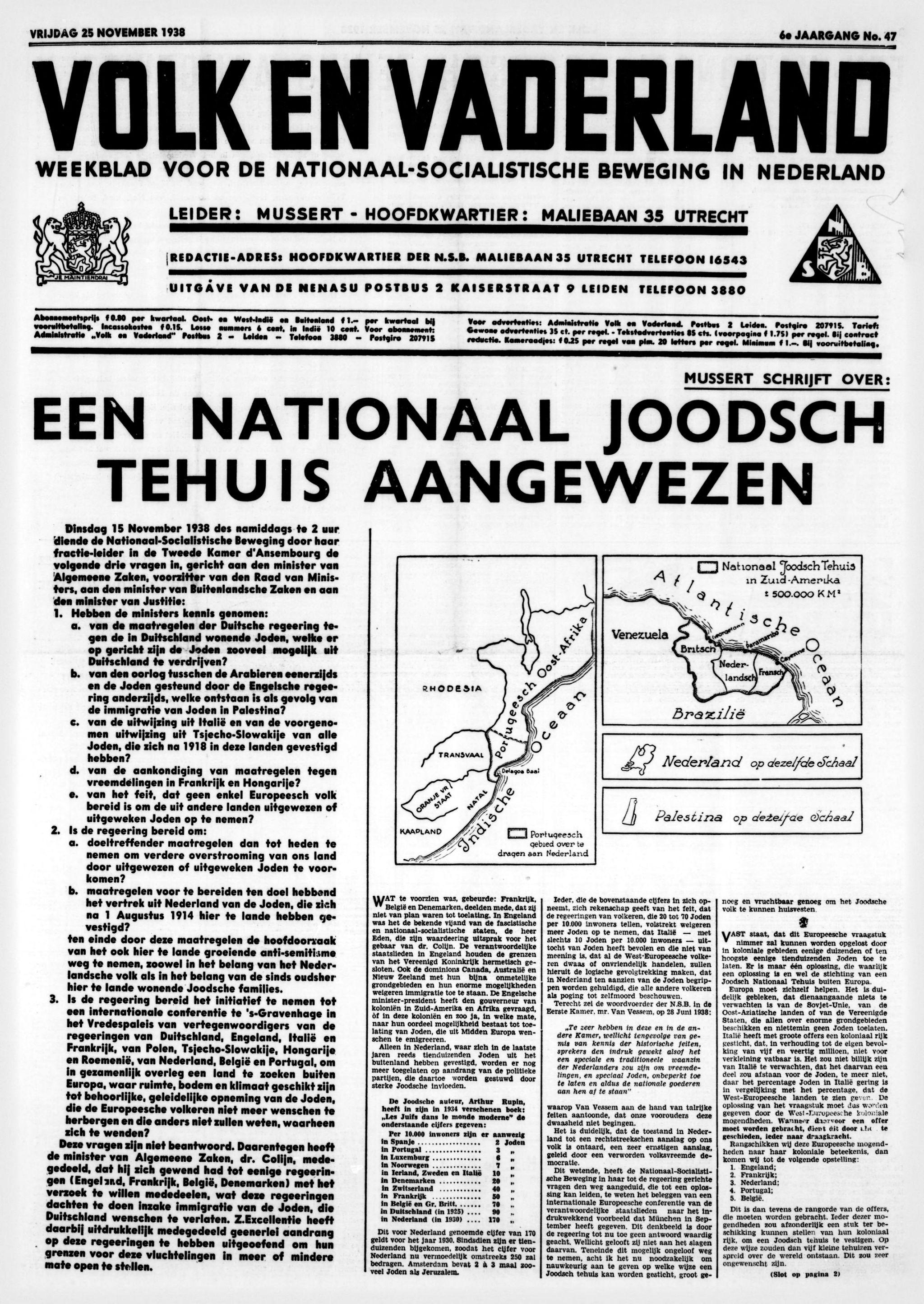 Mussert schrijft over - Een nationaal Joodsch Tehuis aangewezen